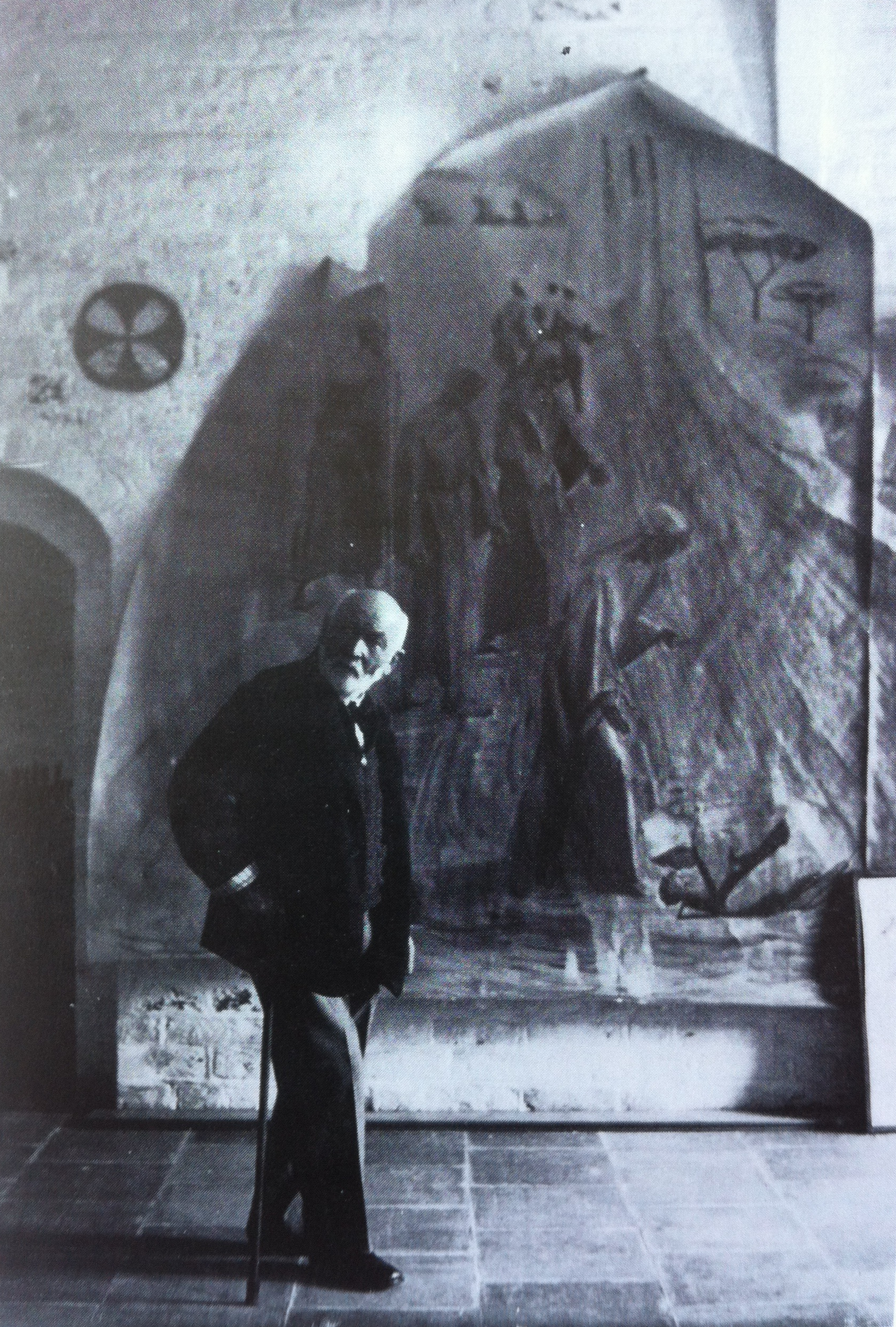 Den danske maler og billedhugger Niels Larsen Stevns